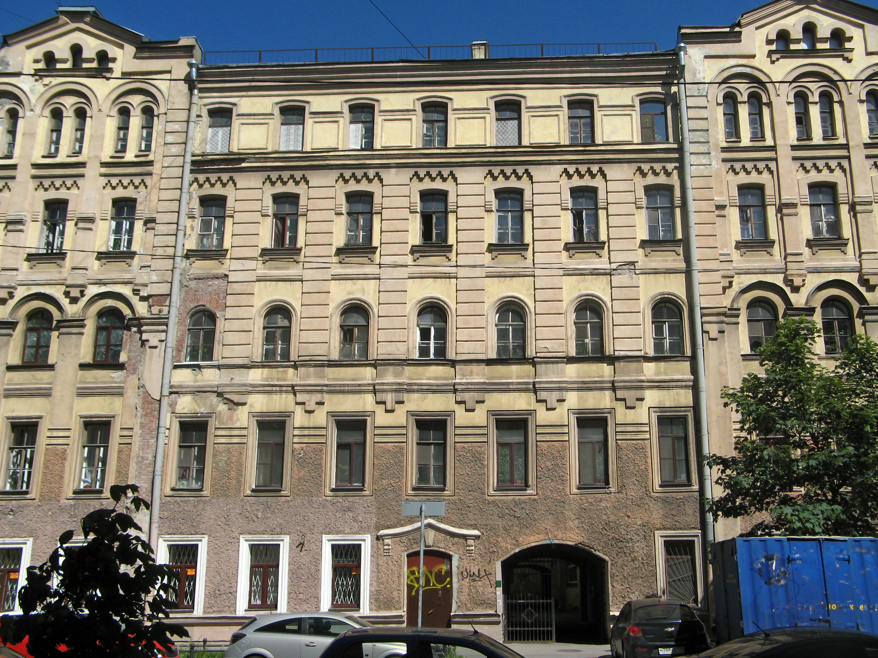 Флигель: 10-я линия Васильевского острова, 39, Василеостровский район, Санкт-Петербург